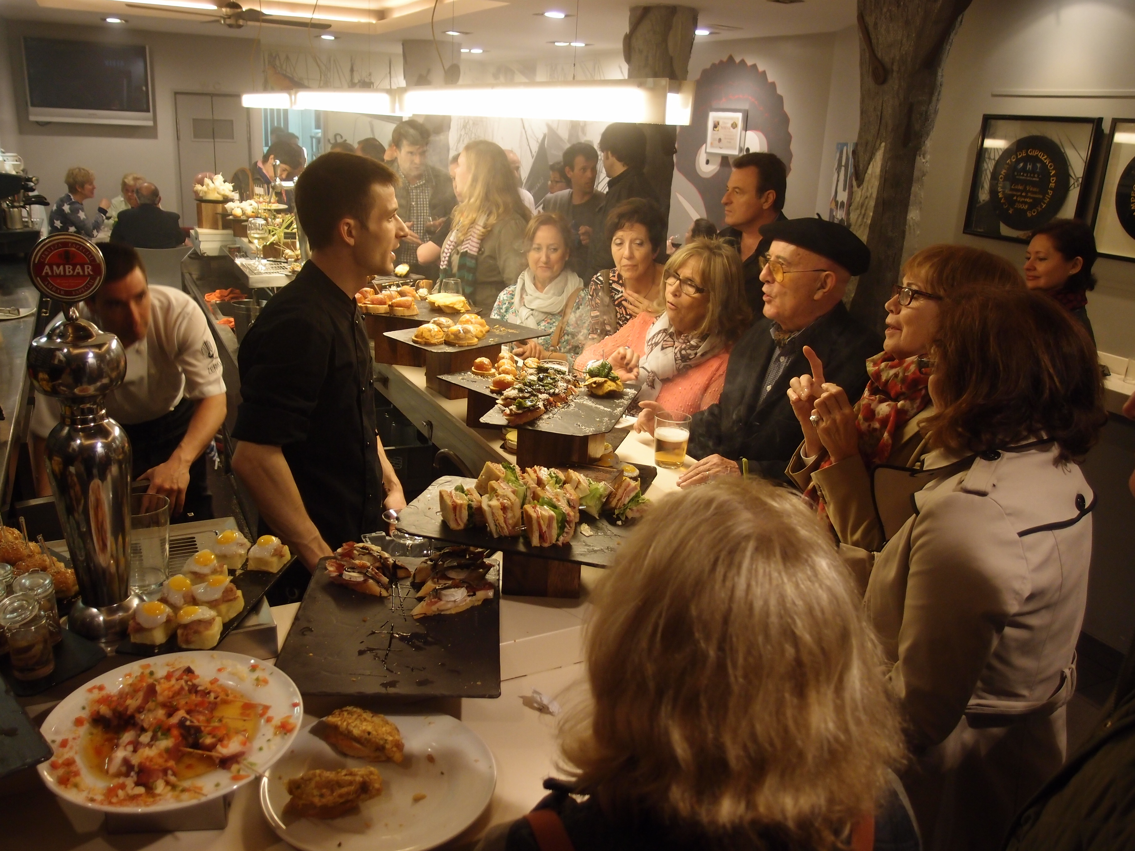 Typische Pintxosbar (Bar Zeruko) in Donostia - San Sebastian Datum: 08.05.2014 Urheber: M. Pfeiffer alias Gordito1869 Quelle: Privates Fotoarchiv des Urhebers